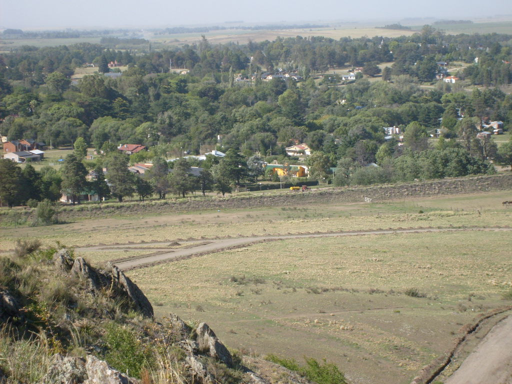 Vista panorámica de Villa la Arcadia desde la sima del Cerro Ceferino (o Cerro del Amor). Mediados de febrero de 2009 . Camára fotográfica SAMSUNG 6 MPx. Modo auto.